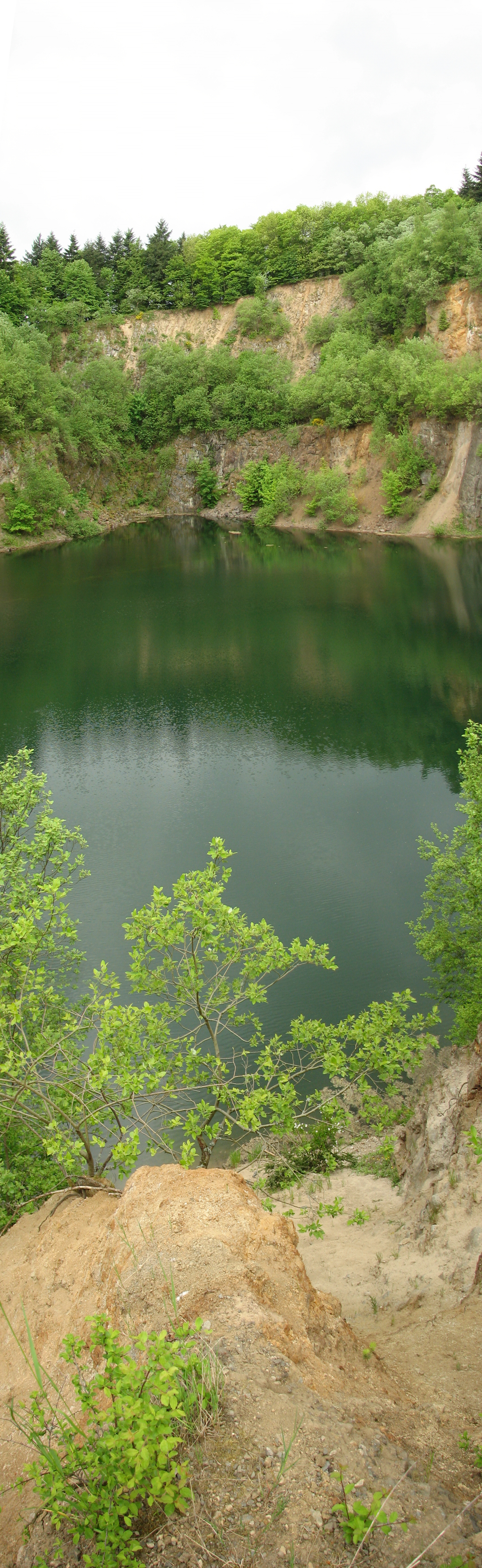 See (im ehemaligen Steinbruch) am Katzenbuckel